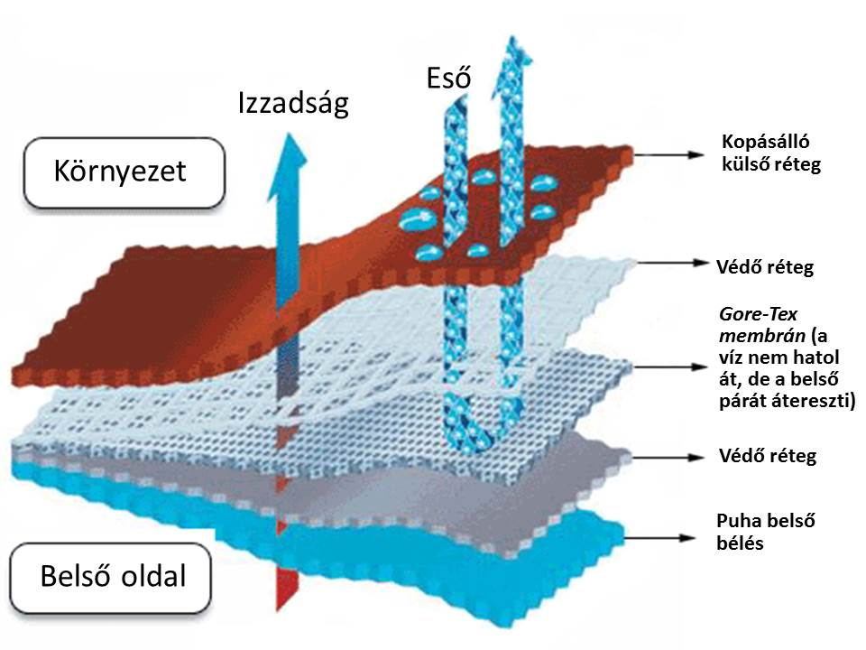 A Gore-Tex membrán működési elve